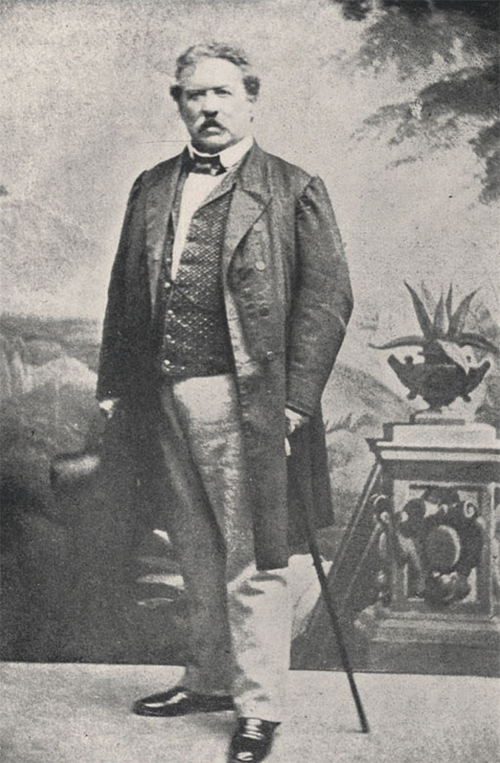 Manuel Bulnes Prieto (Concepción 25 de diciembre de 1799 - 18 de octubre de 1866) fue un militar chileno, presidente de ese país entre 1841 y 1846, siendo reelegido para el periodo inmediatamente siguiente entre 1846 y 1851